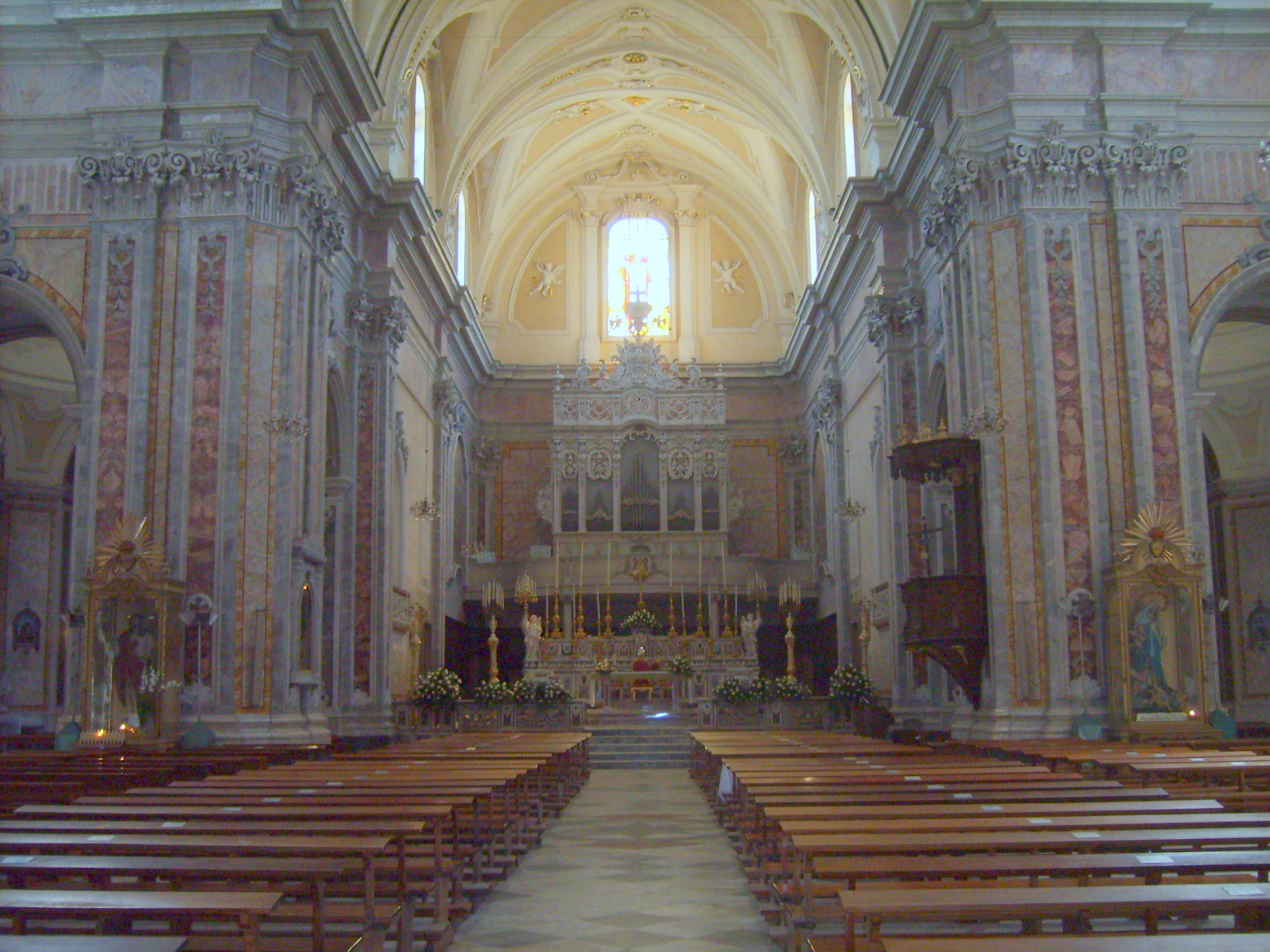 Navata centrale della chiesa matrice di Francavilla Fontana